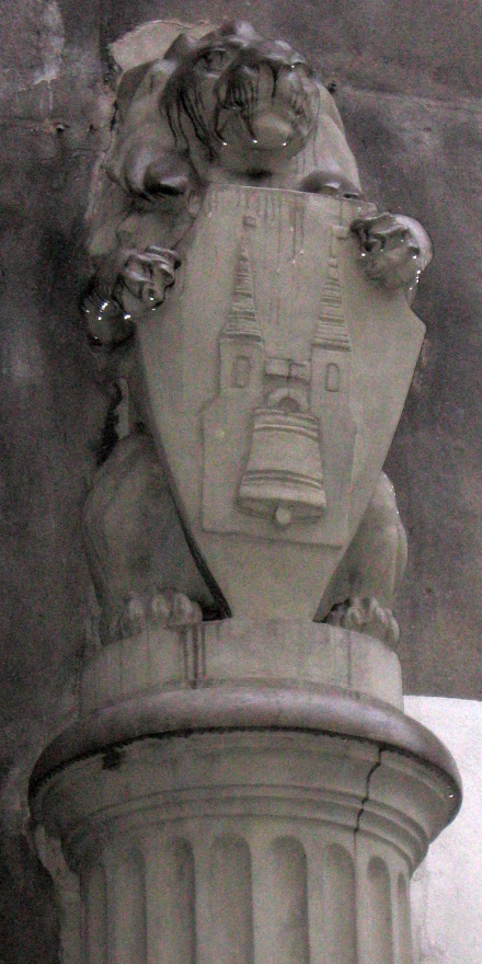 Dzwon Grzesznika i Kościół Marii Magdaleny na tarczy herbowej budynku Liceum Plastycznego przy ul. Nowej 16/Piotra Skargi 24, gdzie w podwórku stała niegdyś ludwisarnia Michaela Wilde, twórcy dzwonu